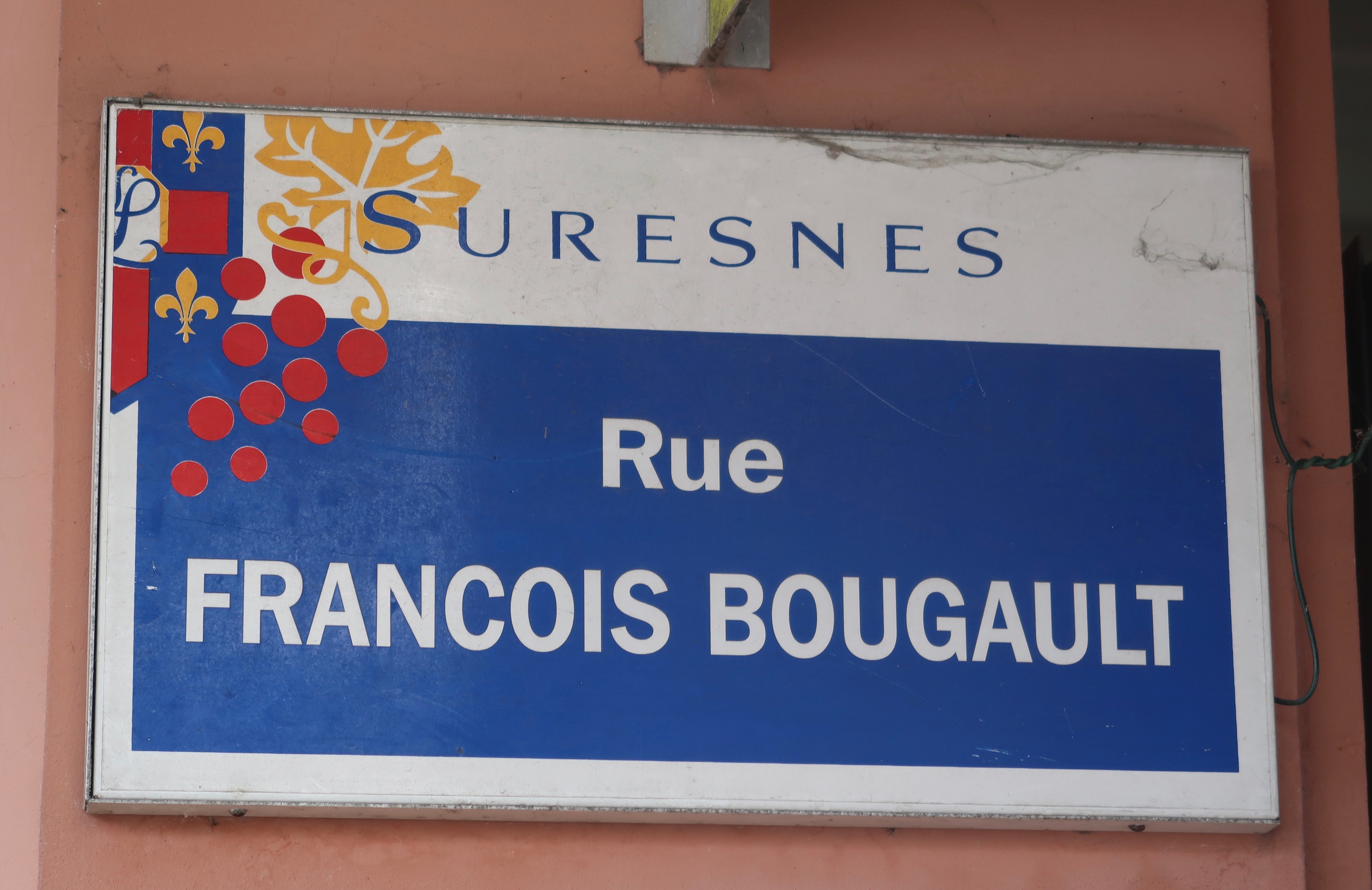 Plaque de la rue Florent-Dancourt à Suresnes (Hauts-de-Seine).